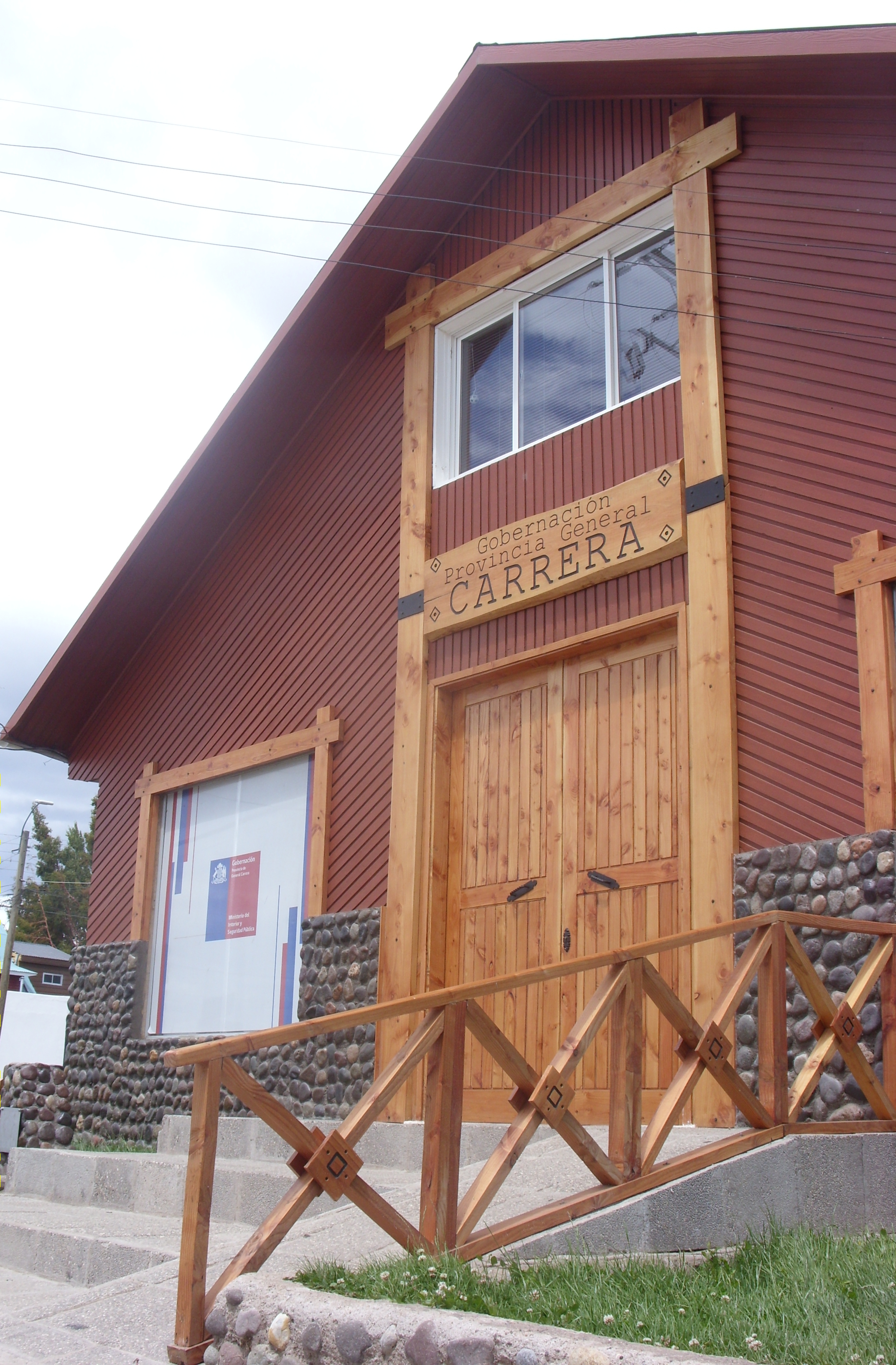 Gobernación de la provincia de General Carrera en Chile Chico, región de Aysén, Chile.